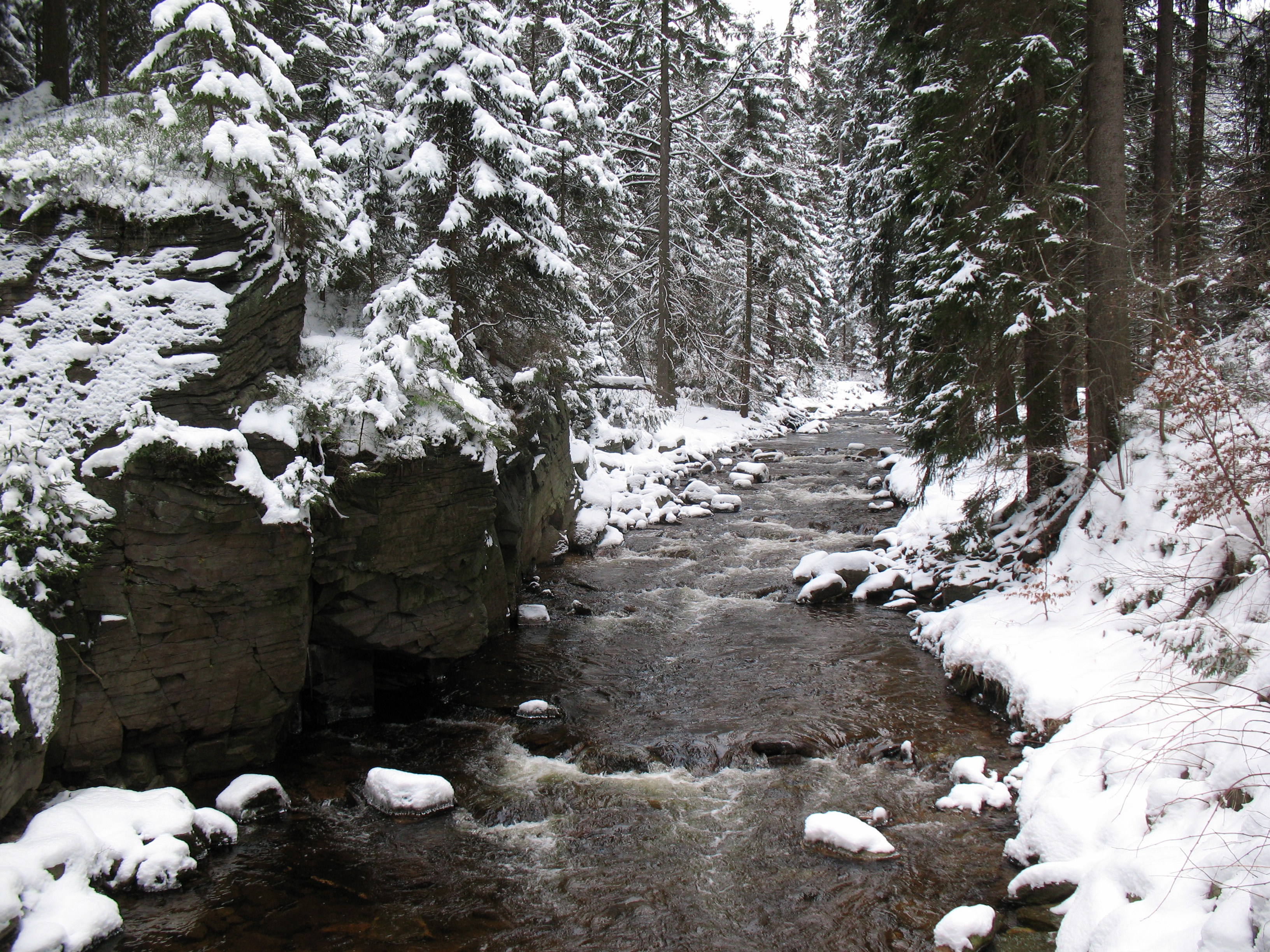 Schwarzwassertal zwischen Kühnhaide und Pobershau im Winter